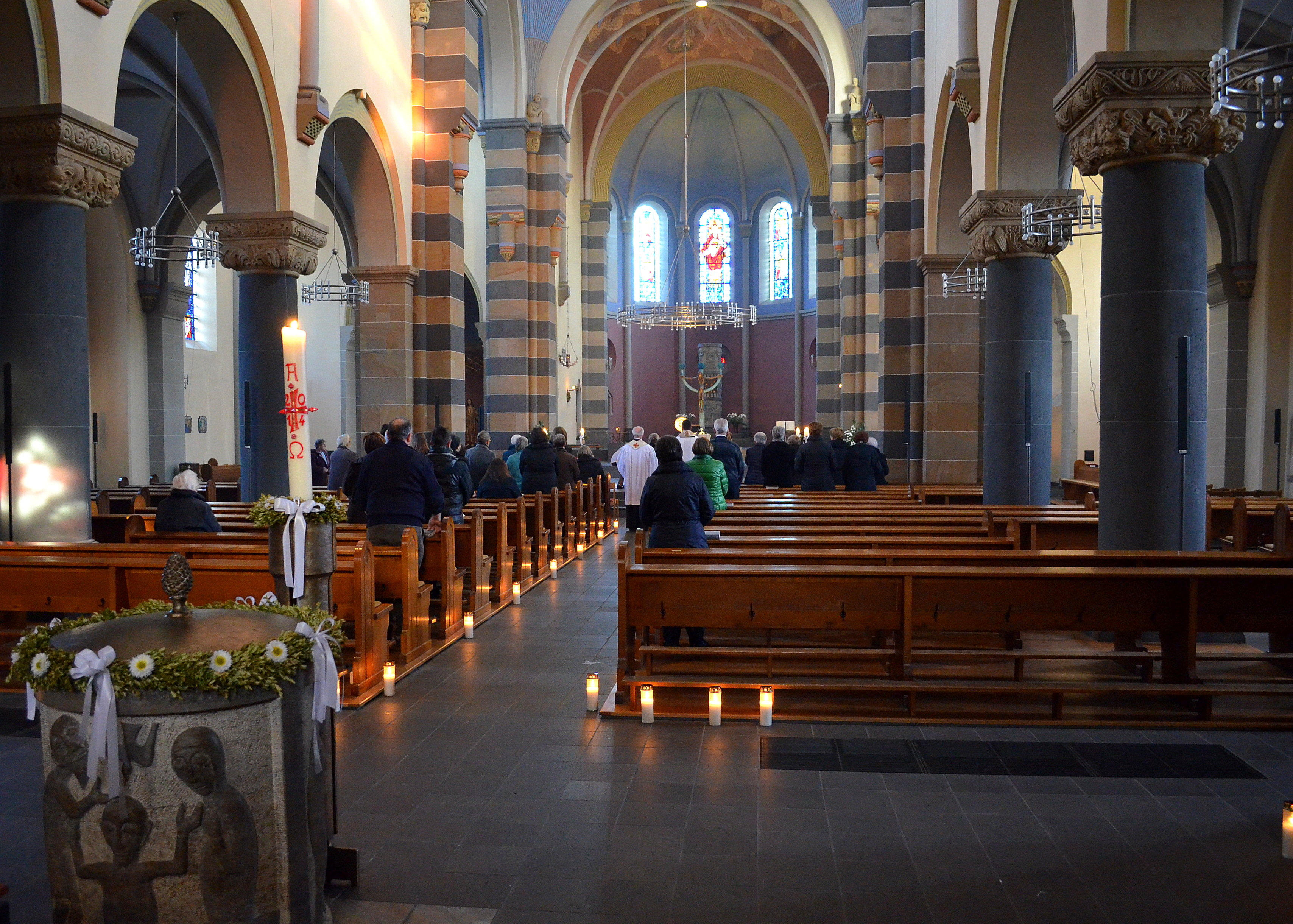 interieur